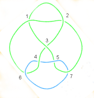 entrelacs avec croisements numérotés